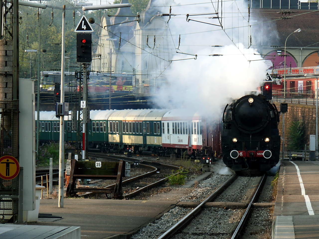 CFL 5519 til Offenburg.